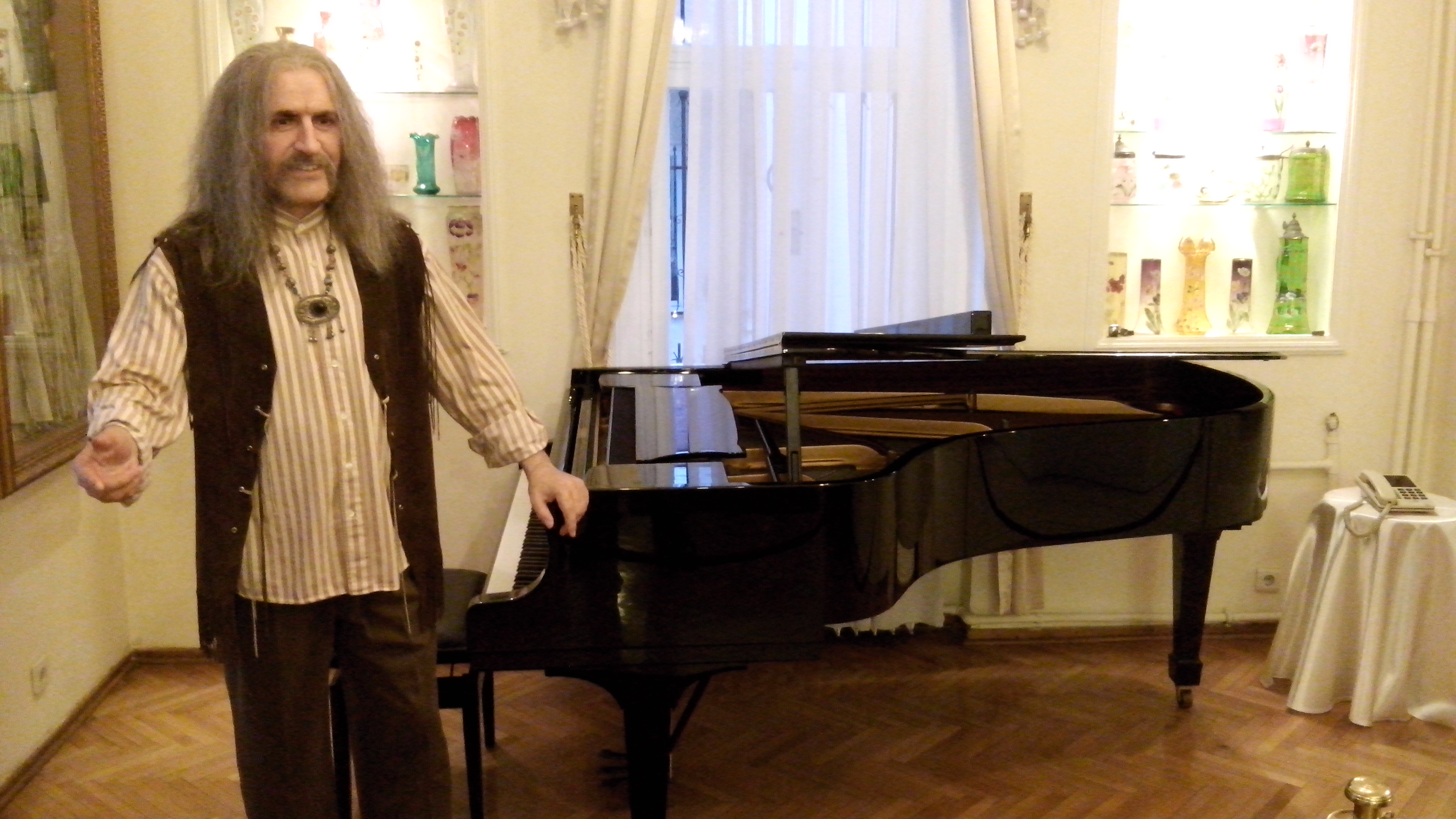 Pianosu başındaki Barış Manço heykeli.